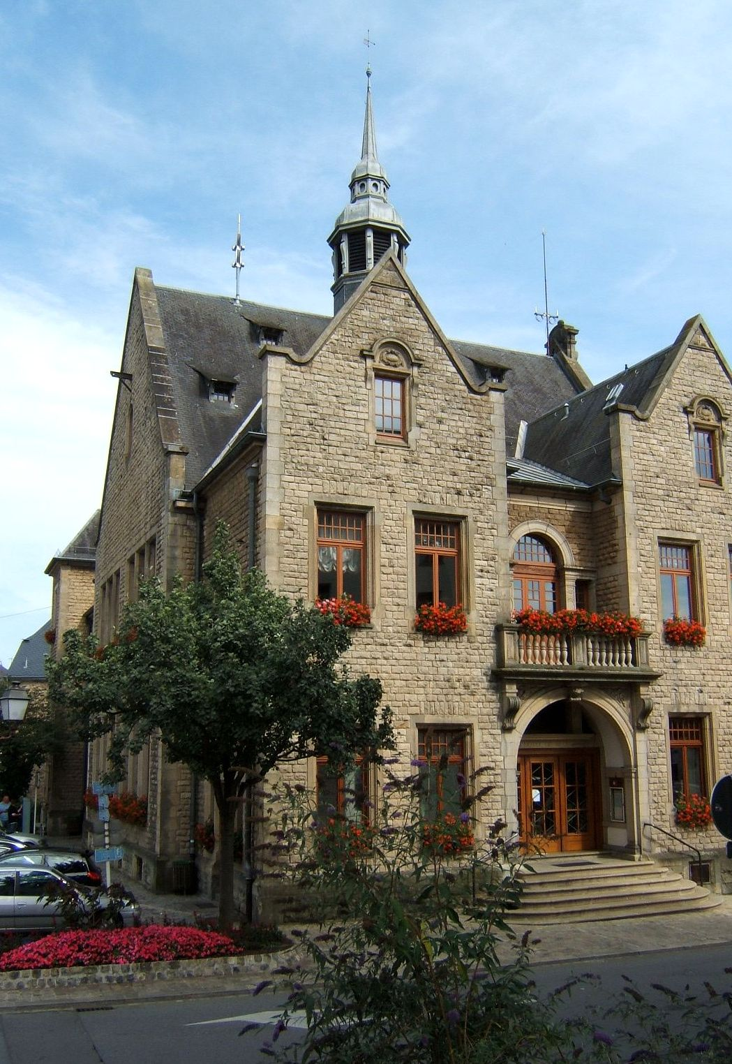 Hotel de ville (city hall) in Ettelbruck, Luxembourg